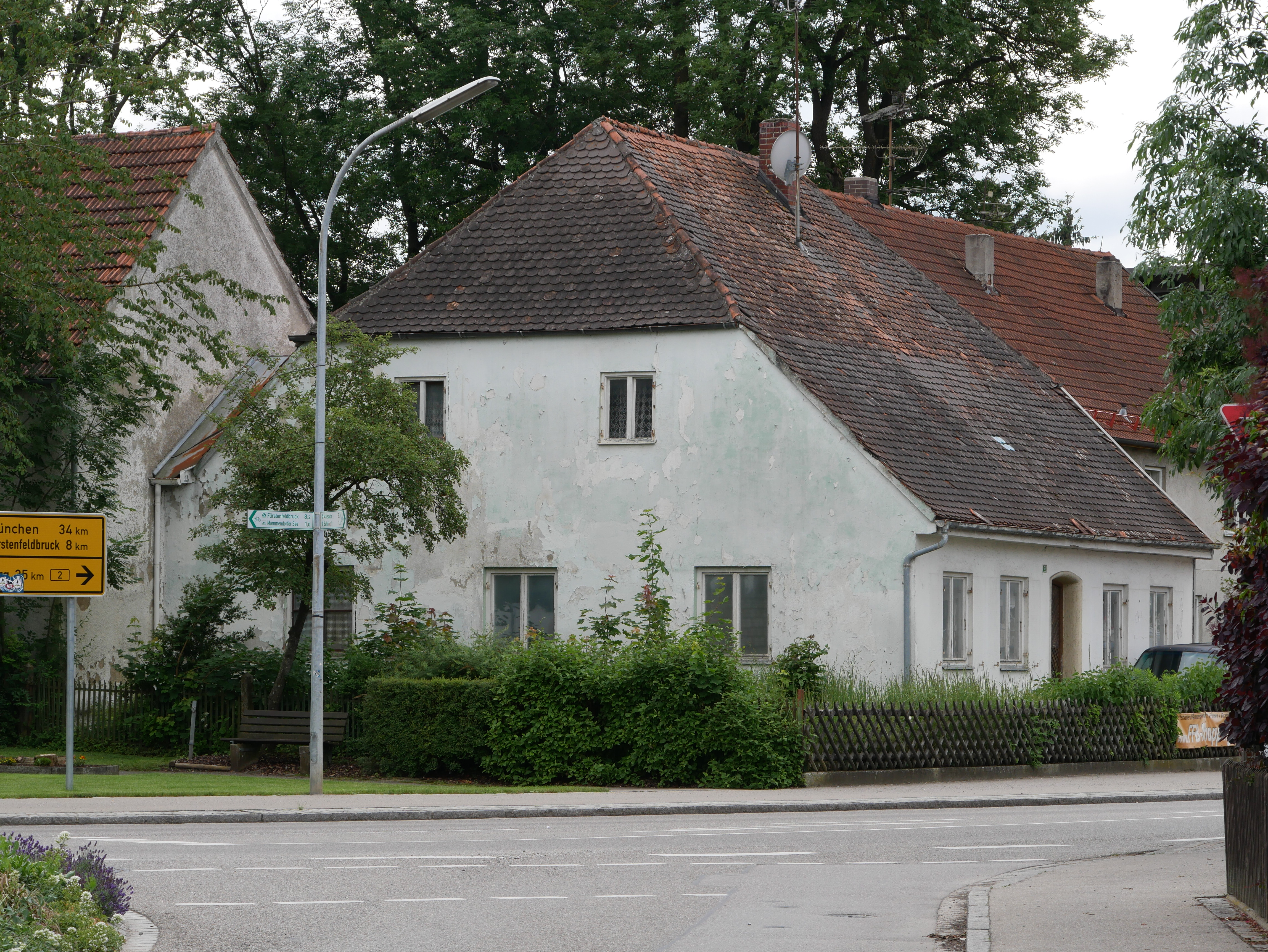 Mammendorf, Augsburger Str. 3, ehemaliges Hirtenhaus mit Halb-Walmdach